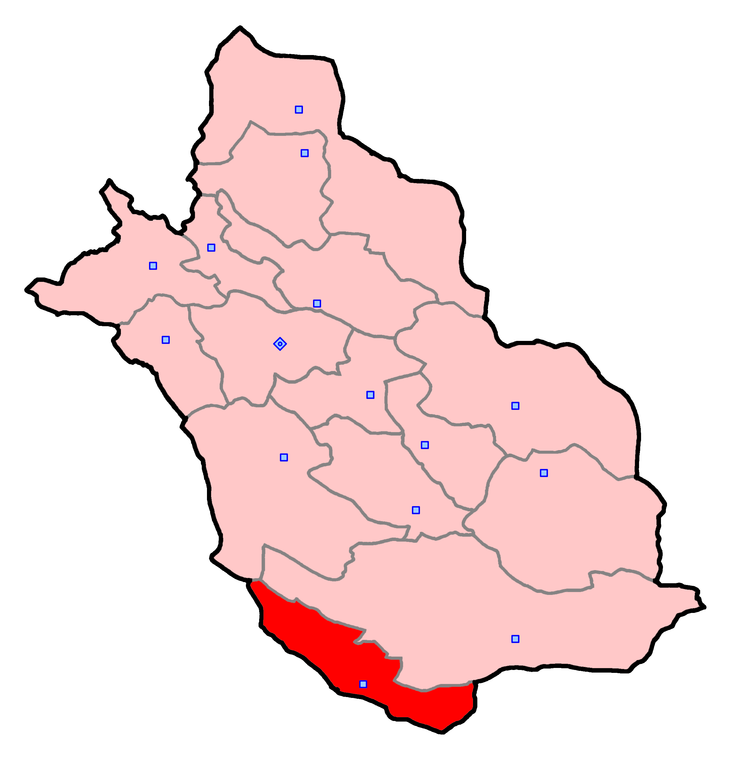 حوزهٔ انتخاباتی لامرد و مهر برای انتخابات مجلس شورای اسلامی